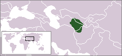 Margiana ca. 300 BCE. (Alternate name: Margu)